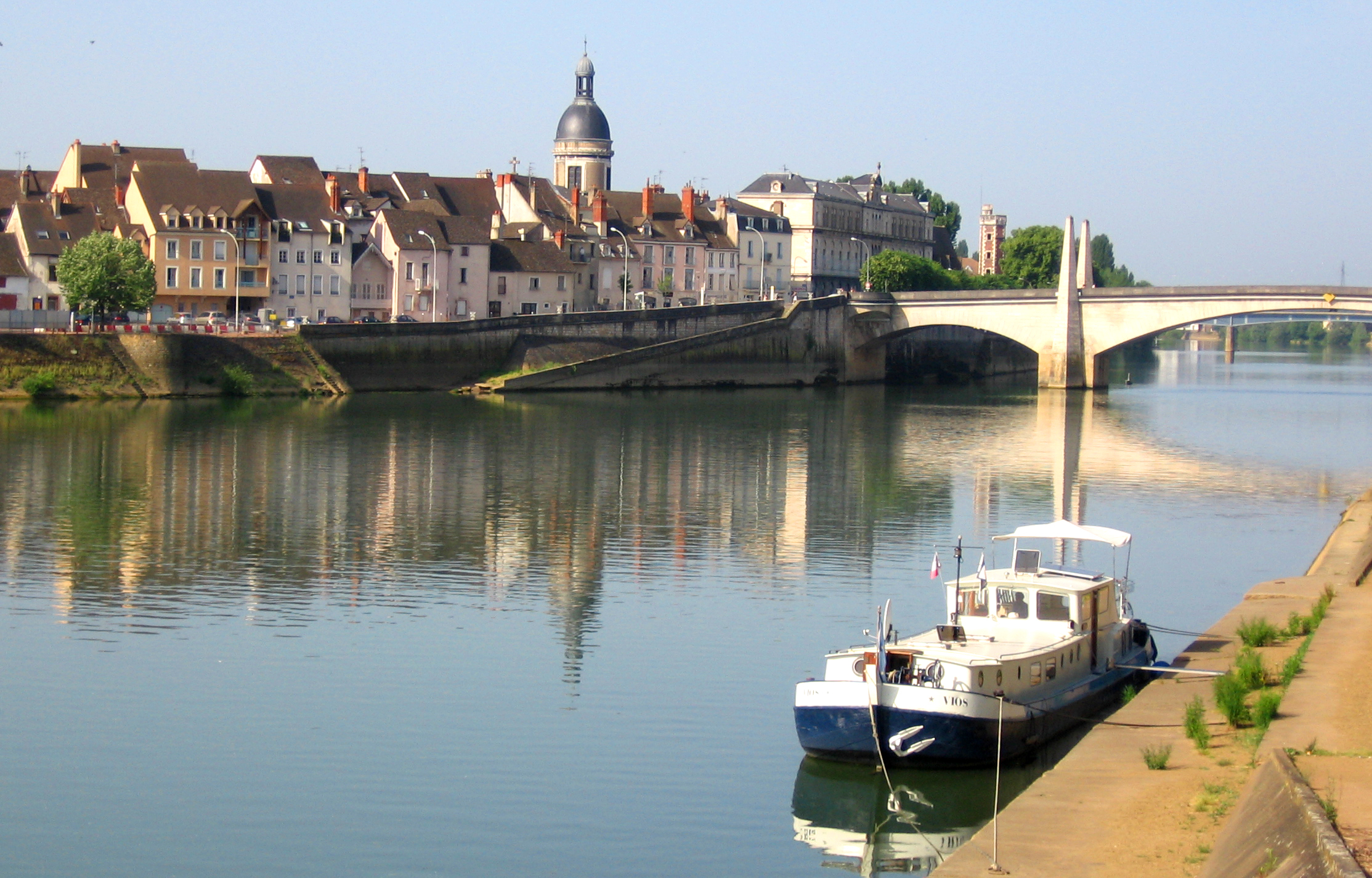 Chalon-sur-Saône